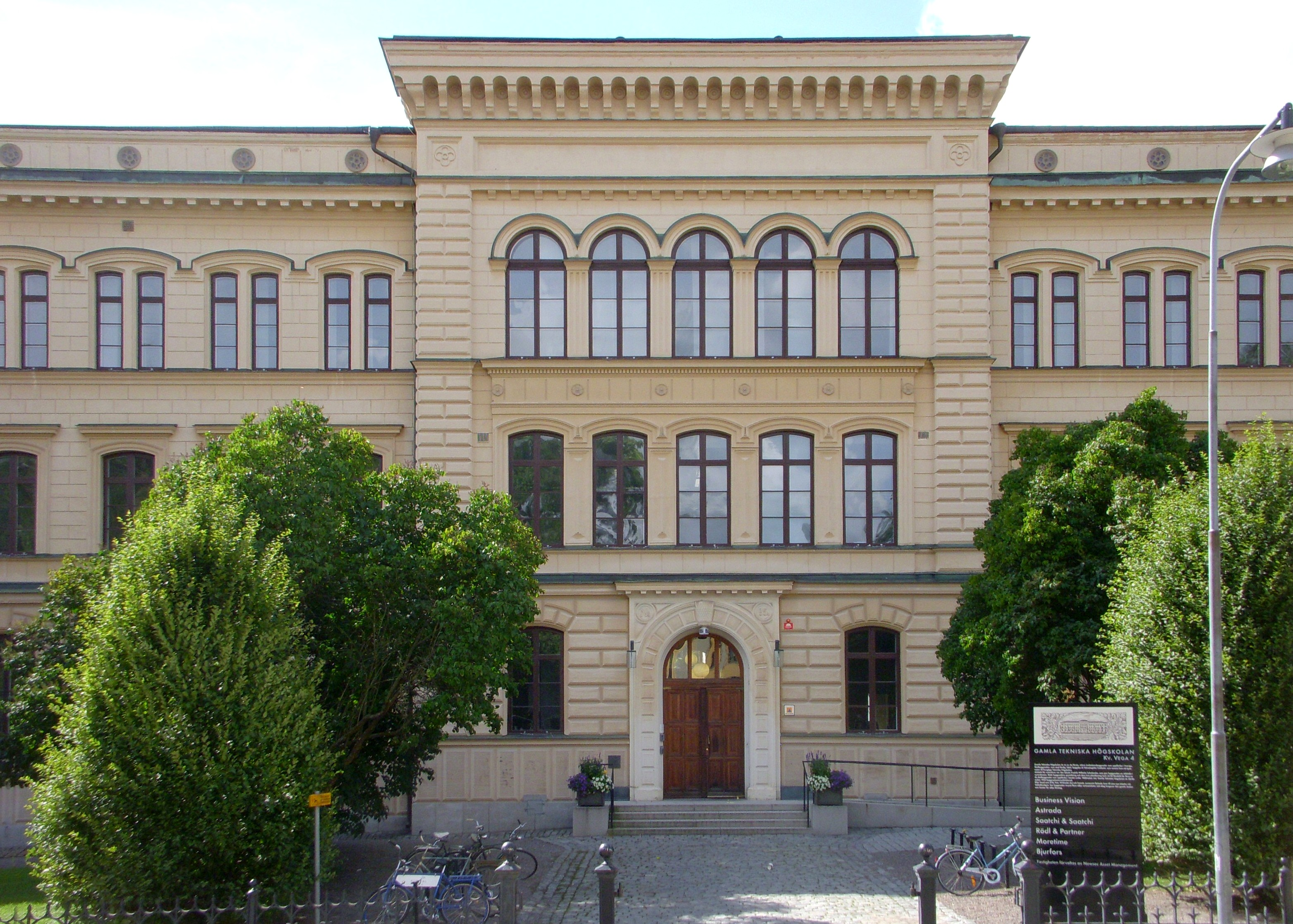 Teknologiska institutets (nuvarande Kungliga tekniska högskolan) gamla lokaler på Drottninggatan 95A i Stockholm.